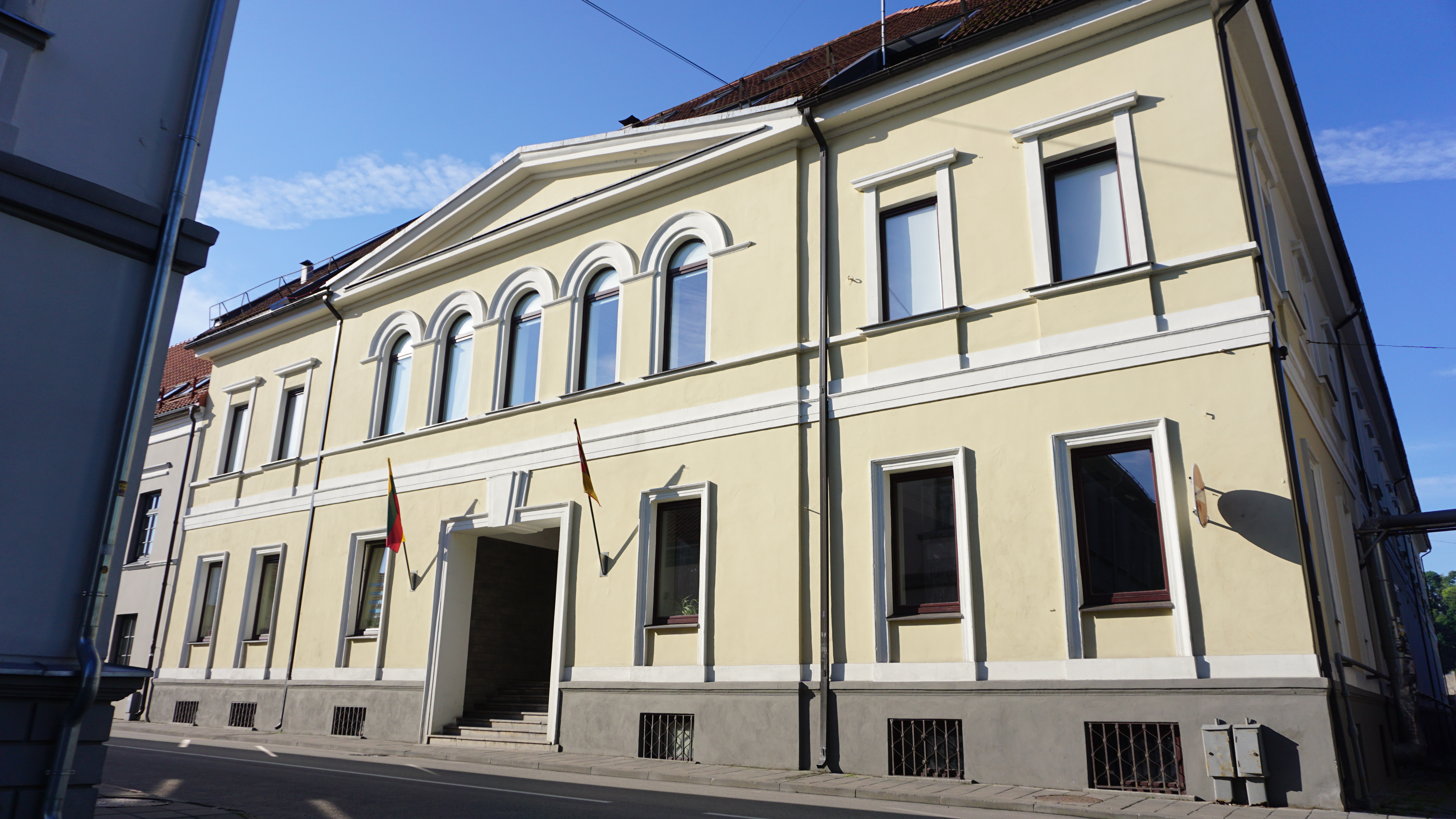 Kauno fakultetas yra Vilniaus dailės akademijos padalinys, teikiantis universitetinį išsilavinimą būsimiems dailininkams, dizaineriams ir architektams. Tęsdamas prieškarinės Kauno meno mokyklos tradicijas, VDA Kauno fakultetas yra pagrindinis vidurio Lietuvos regiono dailės edukacijos centras, sutraukiantis studentus iš beveik 30 šalies rajonų. Fakultete yra 9 katedros, 19 studijų programų.